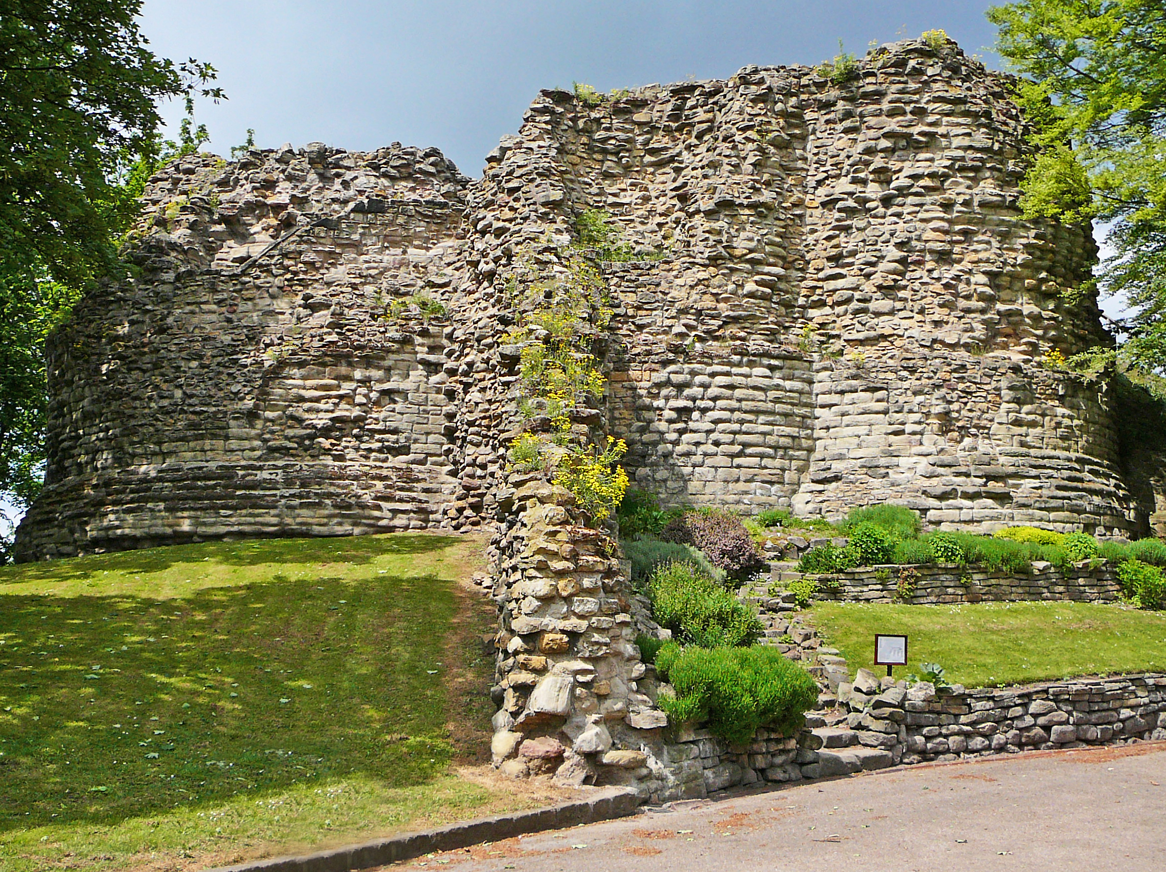 Pontefract Castle ruins